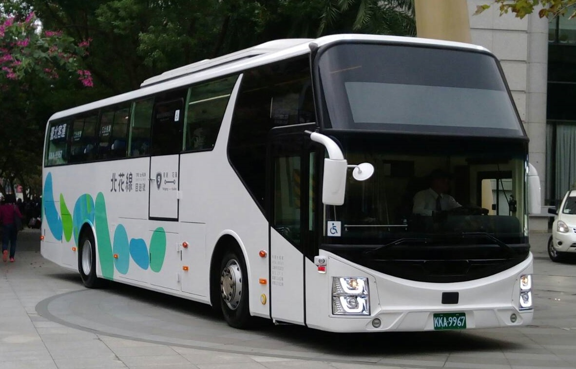 臺北客運 KKA-9967 1071 2019 SCANIA K410IB4X2NB（門側）